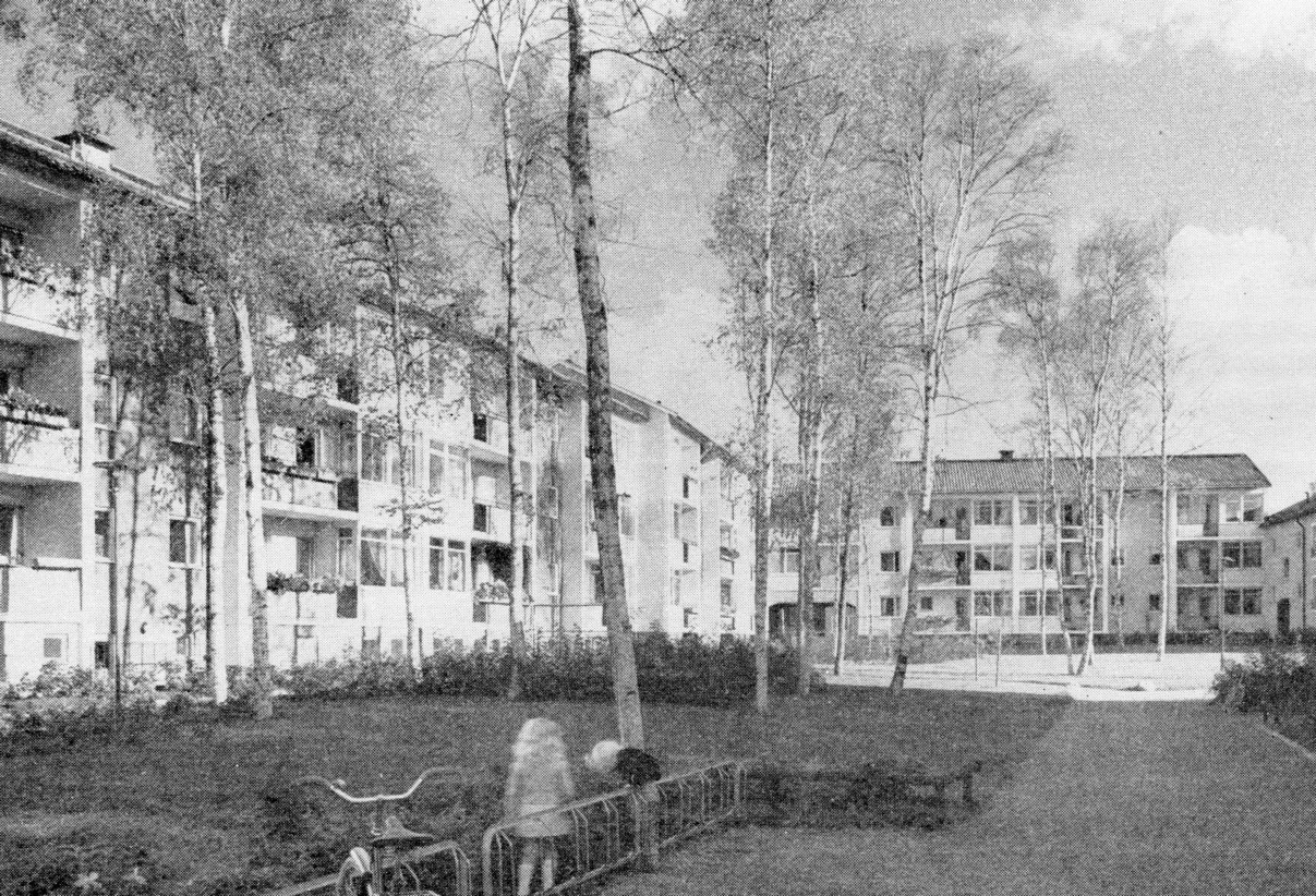 Smalhus i Blackeberg i Stockholm, 1950-tal.